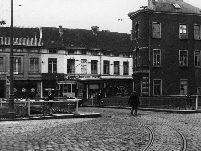 Foto van de bargiebrug te Gent in de jaren 30